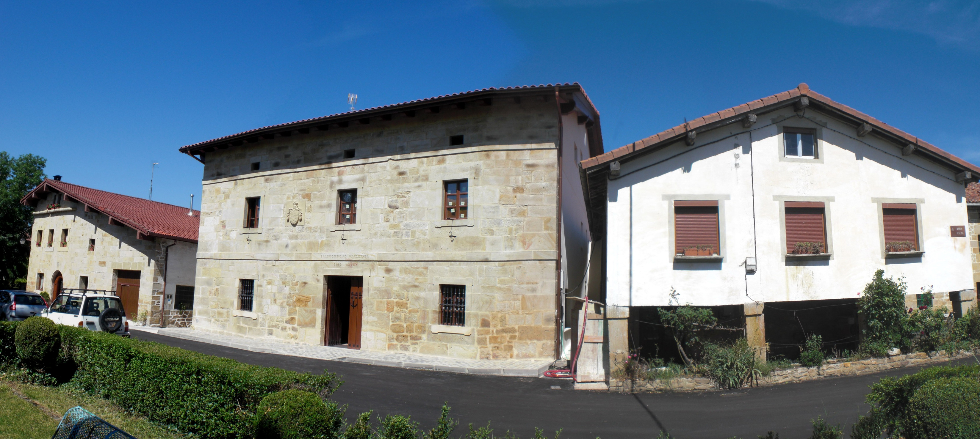 Zalduondoko Udaletxearen fatxada nagusia.